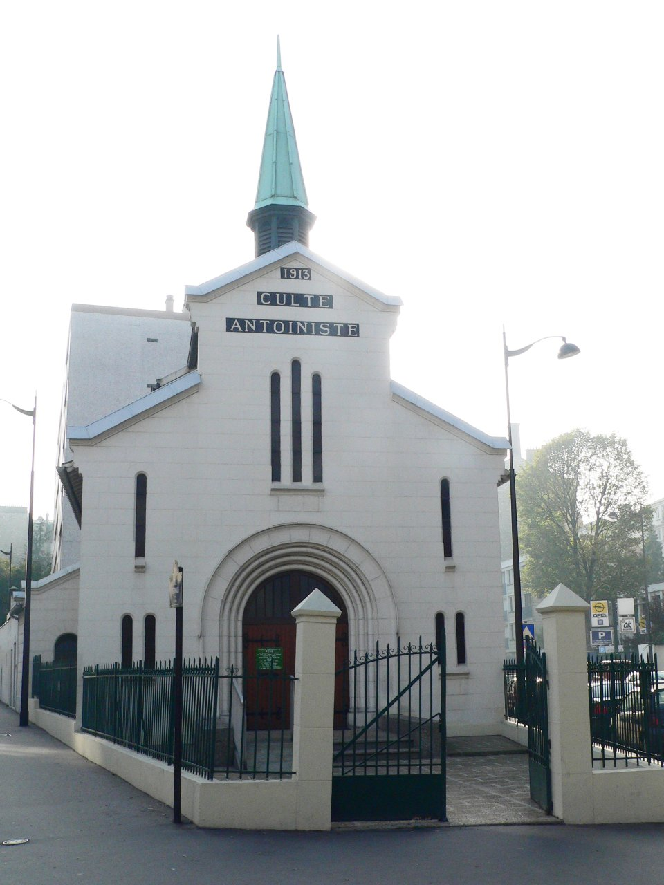 Temple du culte antoiniste, Paris 13ème